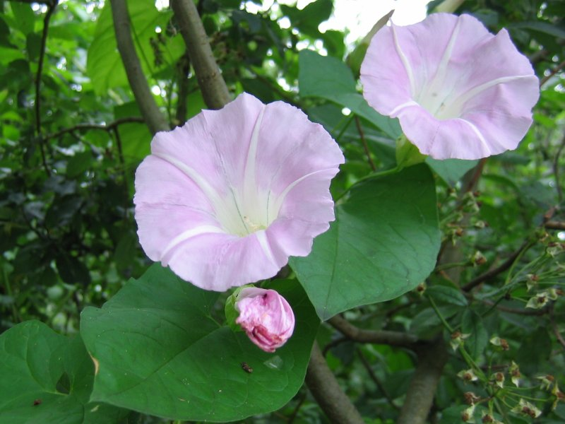 Schöne Zaunwinde Calystegia pulchra